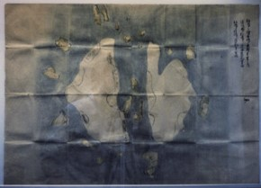 『松嶋絵図』（1656年頃）「松島之絵図島之惣廻リ壱里之内 隠岐国より松島江之渡海道範百里余 松島より竹島江道範三十里余」の記載がある。松嶋（現在の島根県竹島、Liancourt Rocks）最古の地図